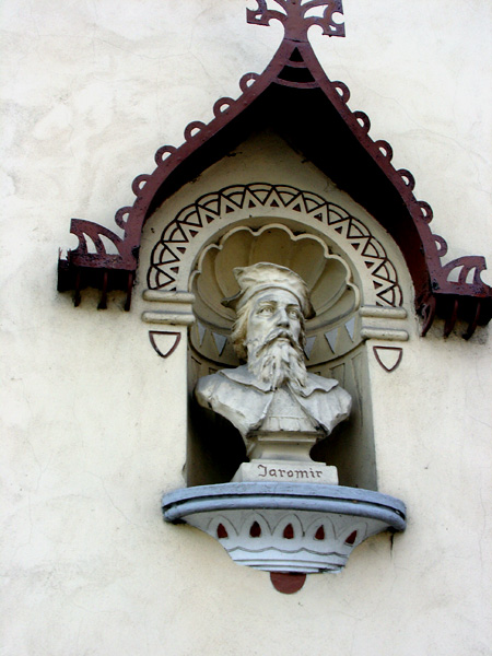 busta knížete Jaromíra, zakladatele jaroměře Jaroměř Czech Republic Europe